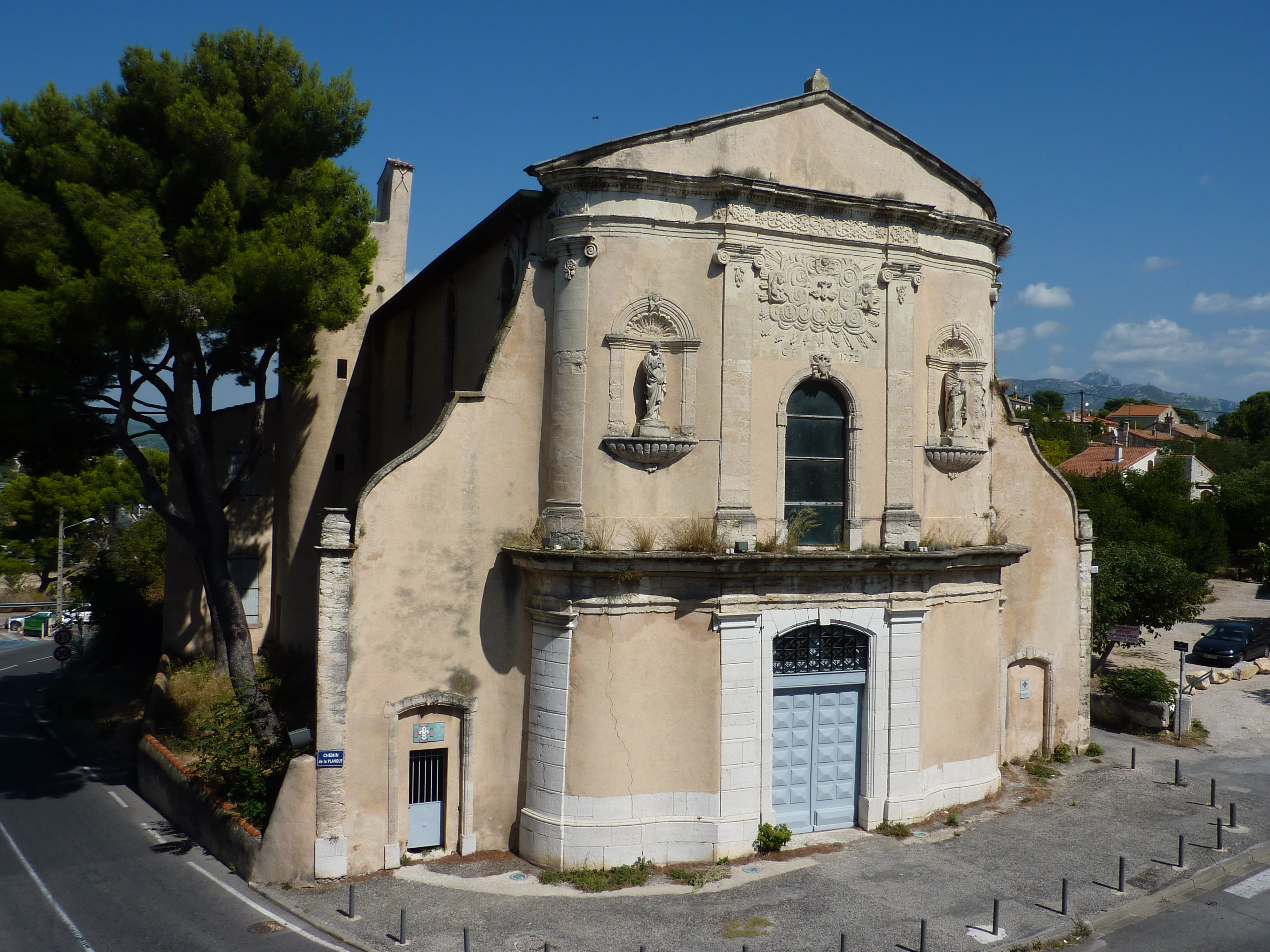 Chapelle des Pénitents blancs (Aubagne, Bouches-du-Rhône, France) .